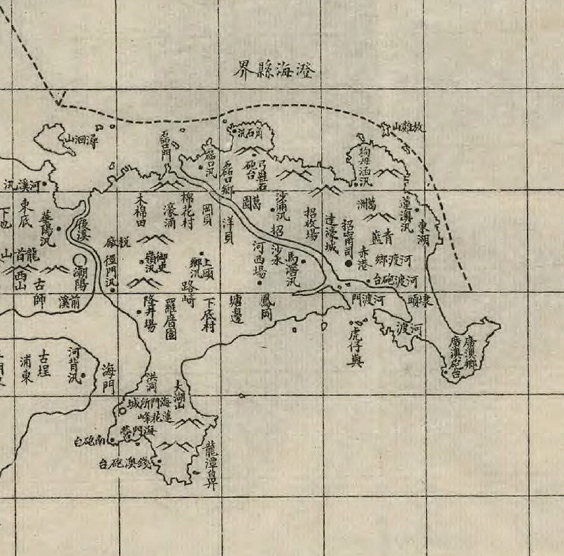 截自1897年《广东舆地全图》